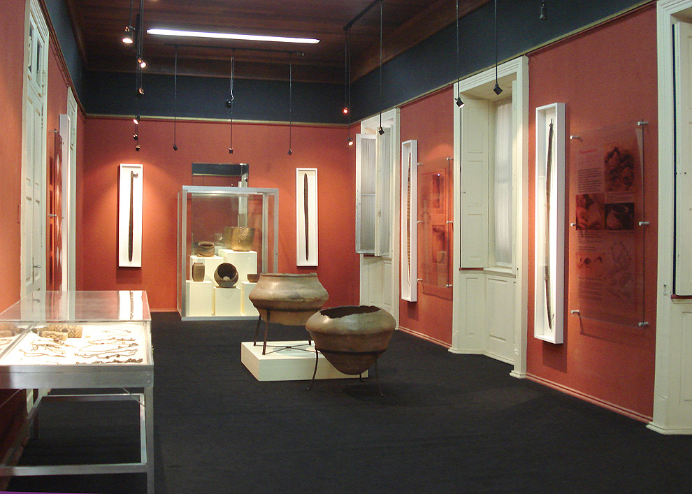 Interior do Museu Júlio de Castilhos, Porto Alegre, Brasil. Sala Indígena.